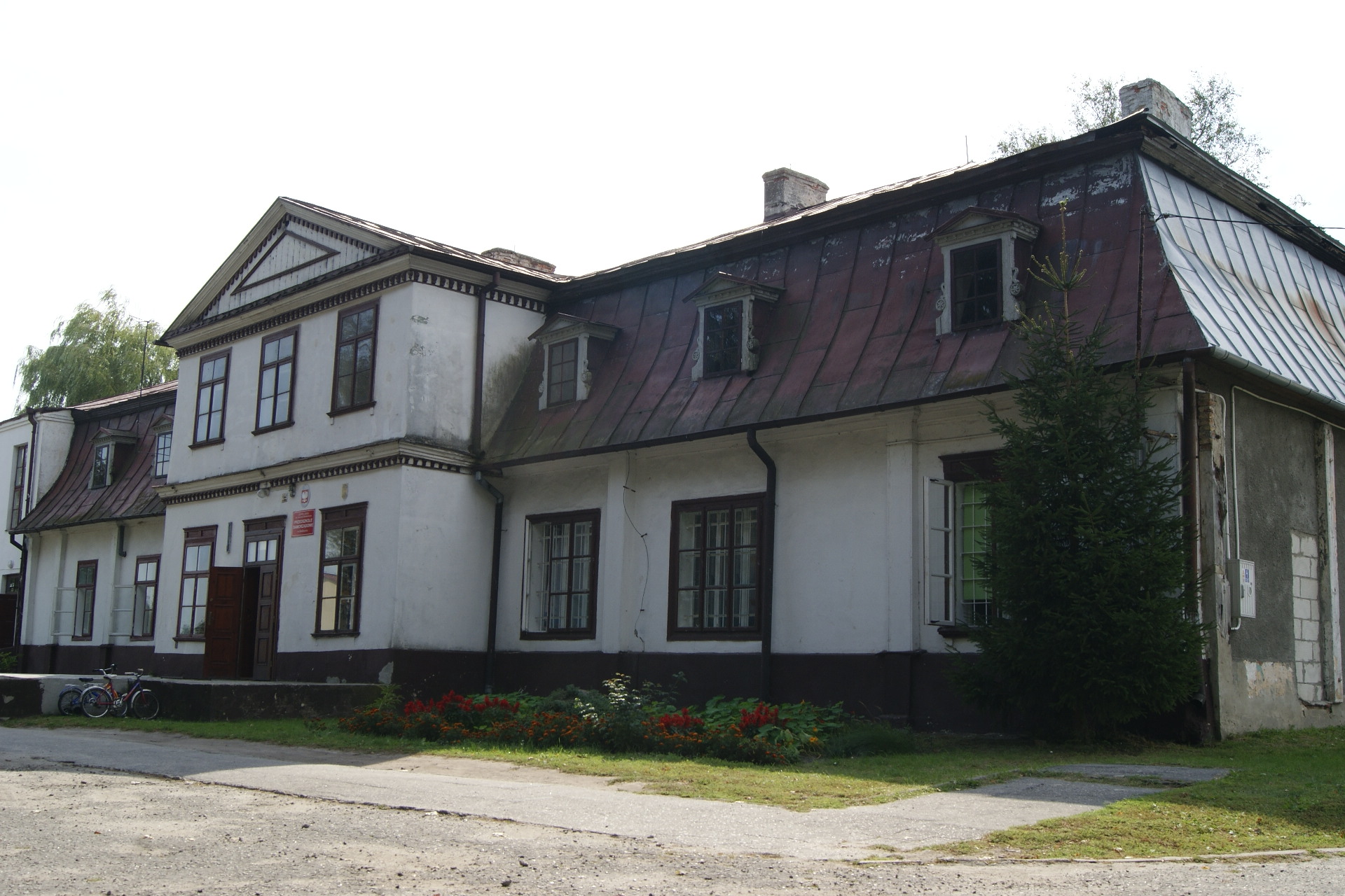 Siedliszcze Siedliszcze-Kolonia - zespół dworski (zabytek nr rejestr. A/324)